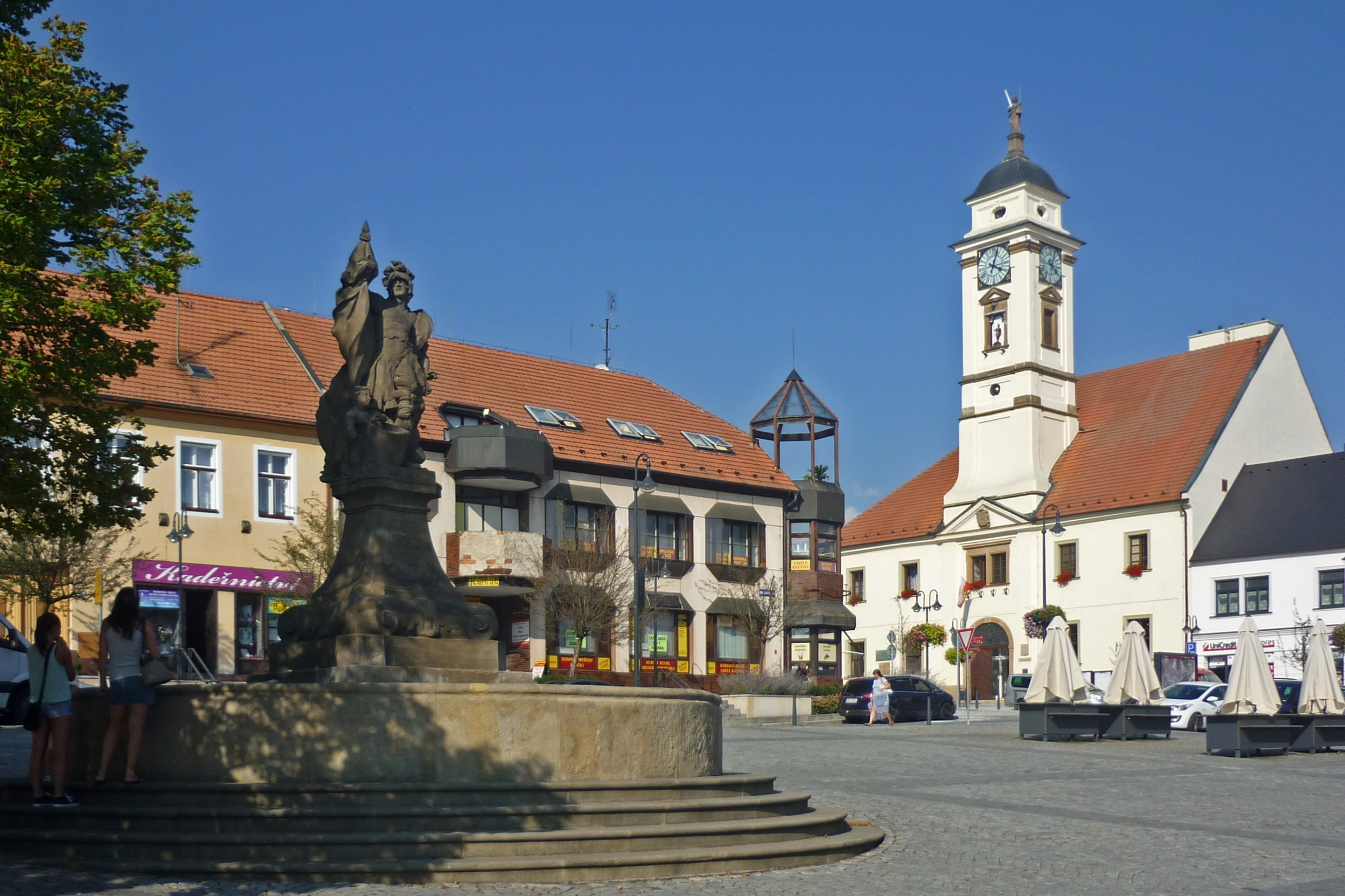 Ungarisch Brod (Uherský Brod), Masaryk-Platz